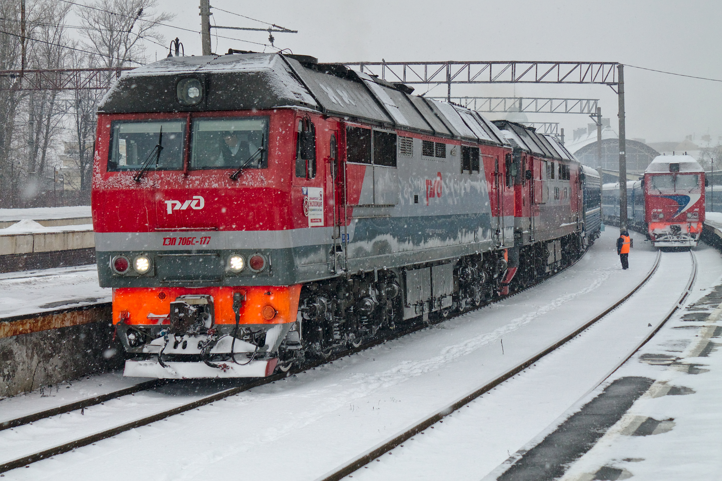 ТЭП70БС-177, СПб - Брест, станция Санкт-Петербург-Витебский. см. фото 633406 в альбоме автора